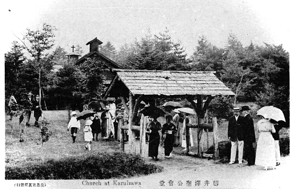 Karuizawa, Nagano, Japan, 1920s